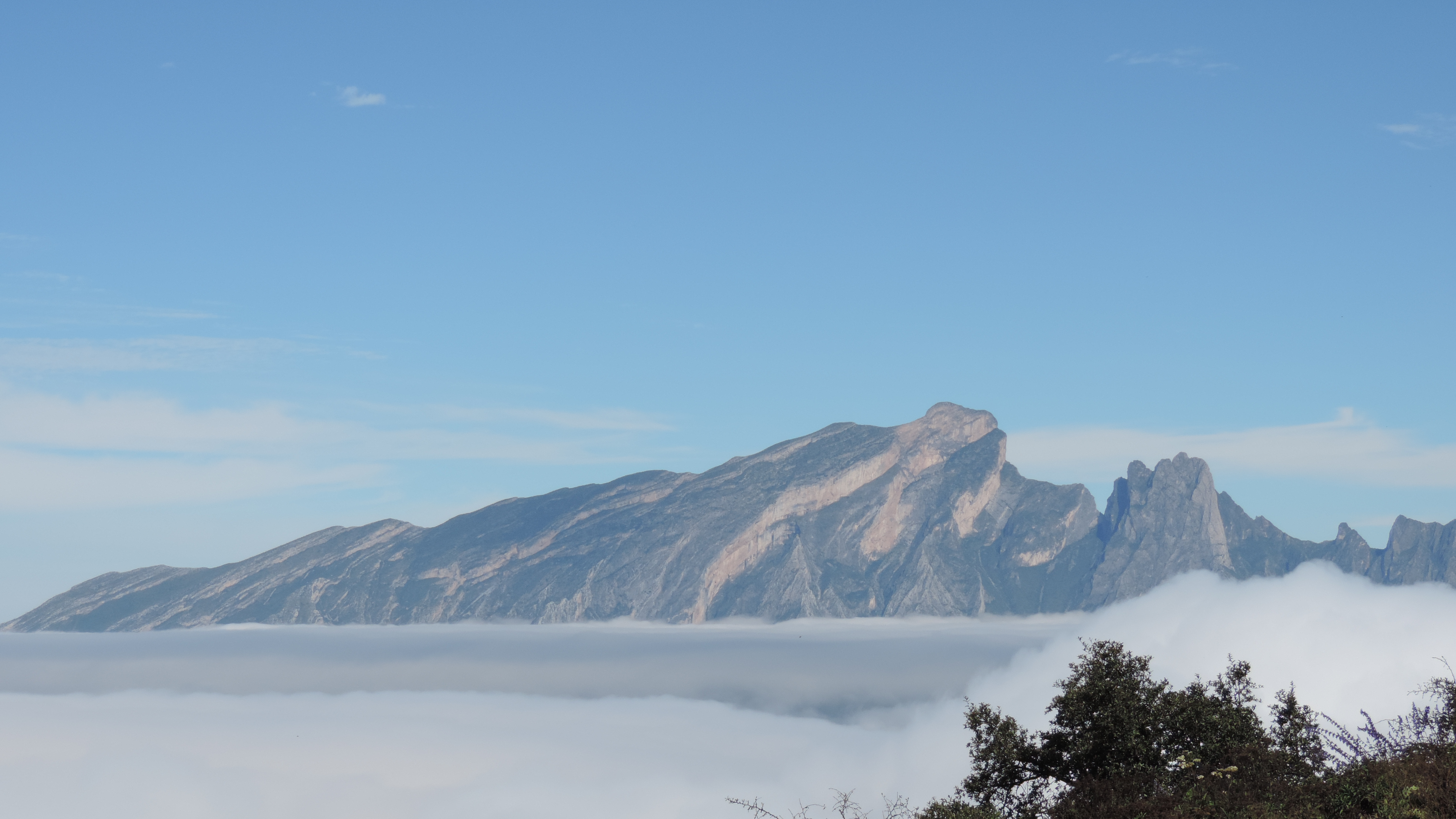 Sierra del Fraile, Pico el Sapo, visto desde Mota Chica